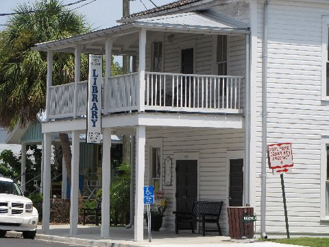 Cedar Key library